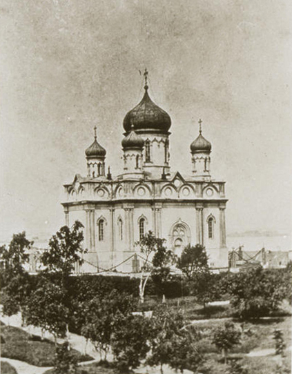 Suomenlinnan kirkko 1900